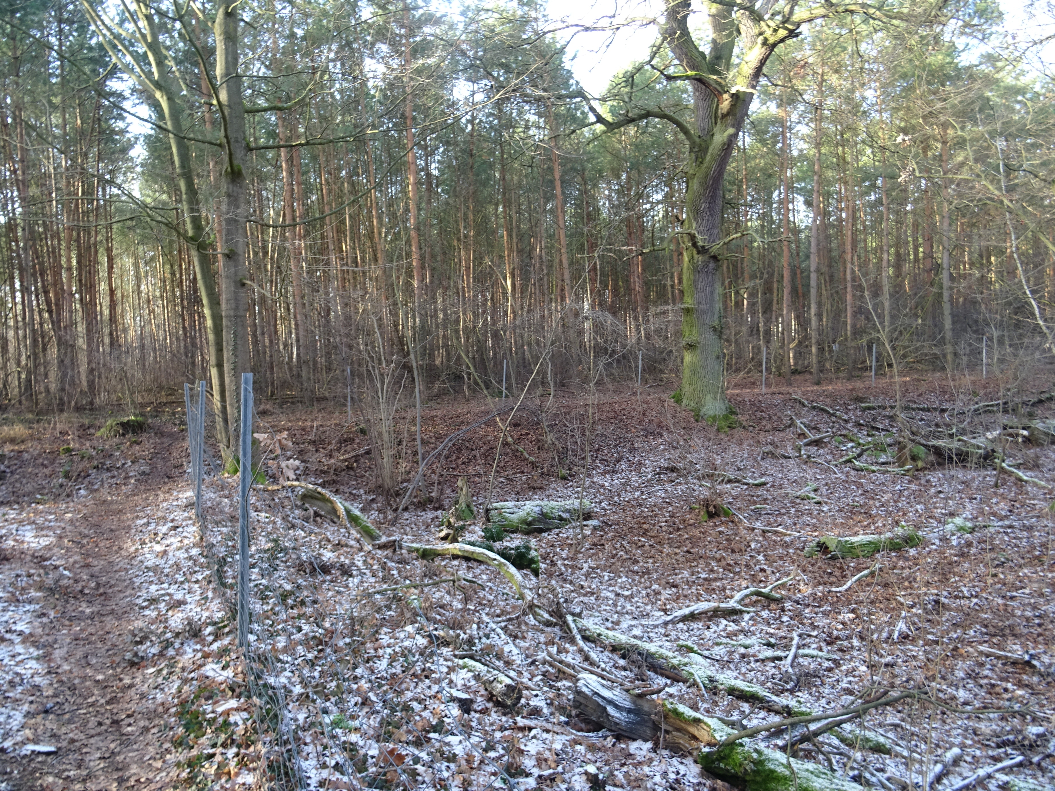 ntenfängerteich südlich von Golm, Stadt Potsdam, am Rand von Wildpark-West, Kulturdenkmal. Südwestecke mit den Wällen zur Süd- und Westseite